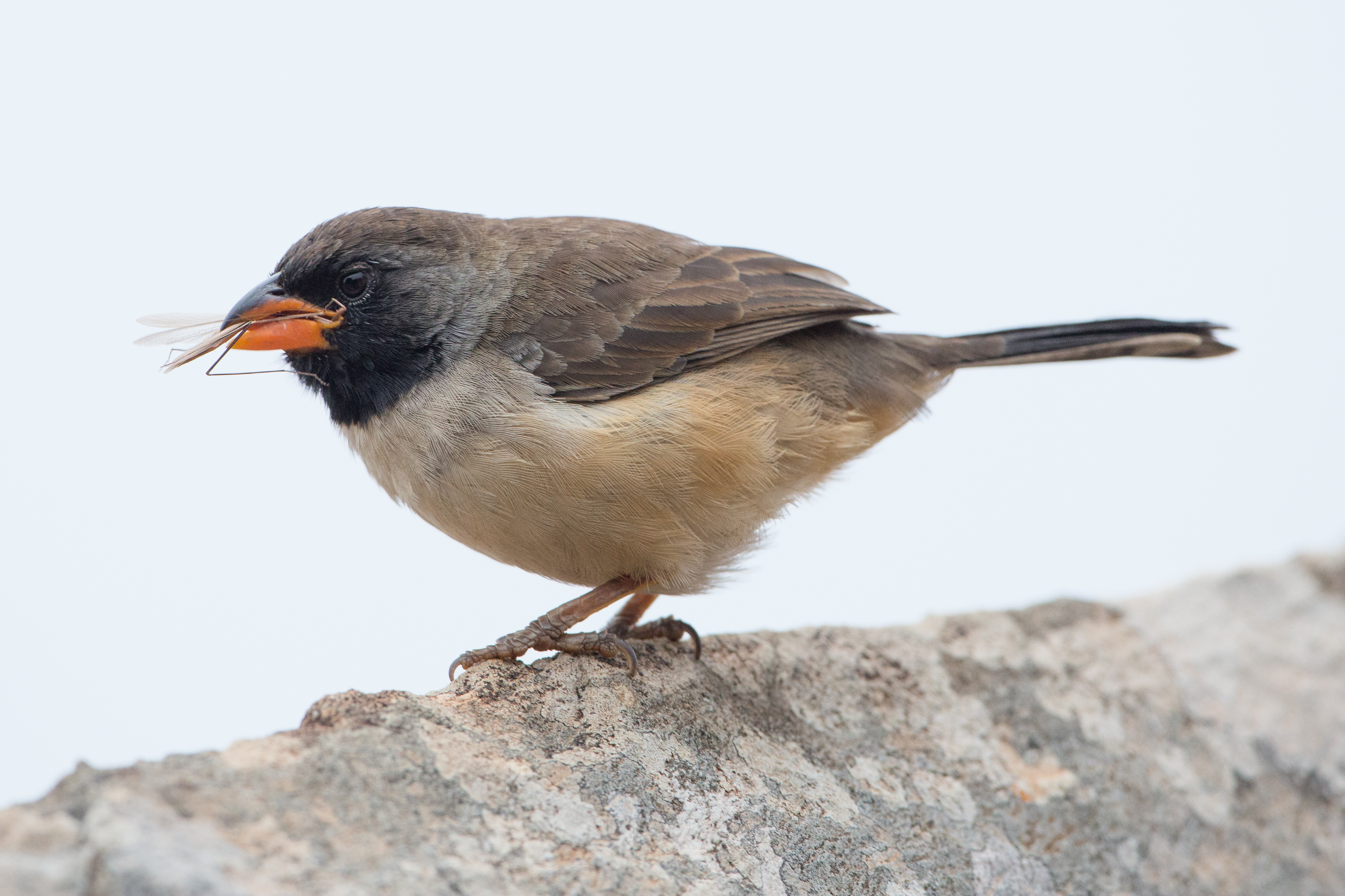 Bico-de-pimenta (Saltatricula atricollis) no Parque Nacional da Serra da Canastra